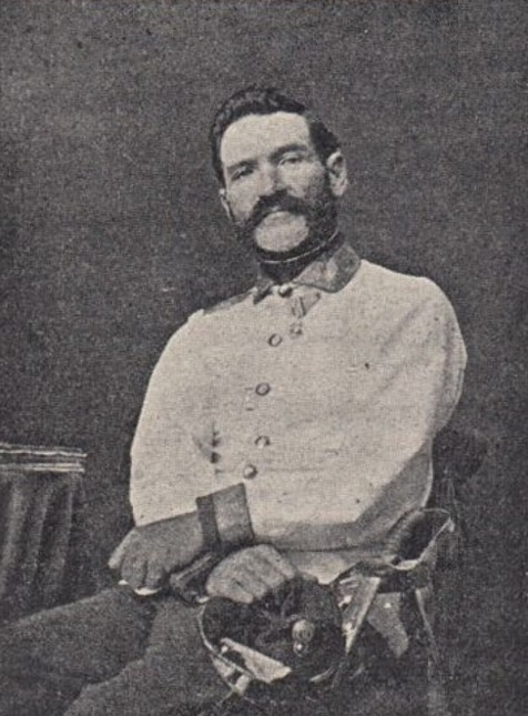 Franz von Hruschka (1819 - 1888), Rakouský a český voják, včelař a hoteliér.